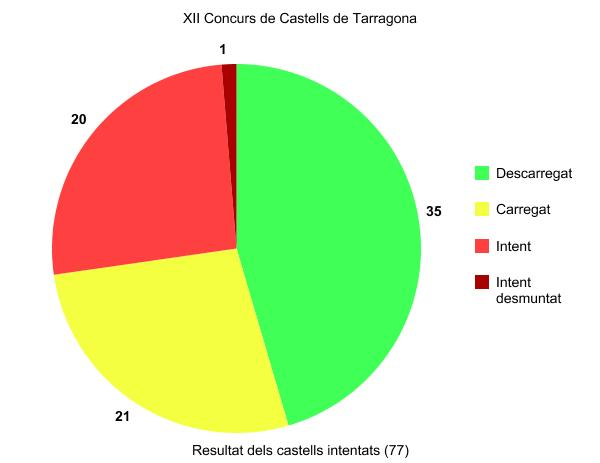 Gràfic sobre els castells intentats en el XII concurs